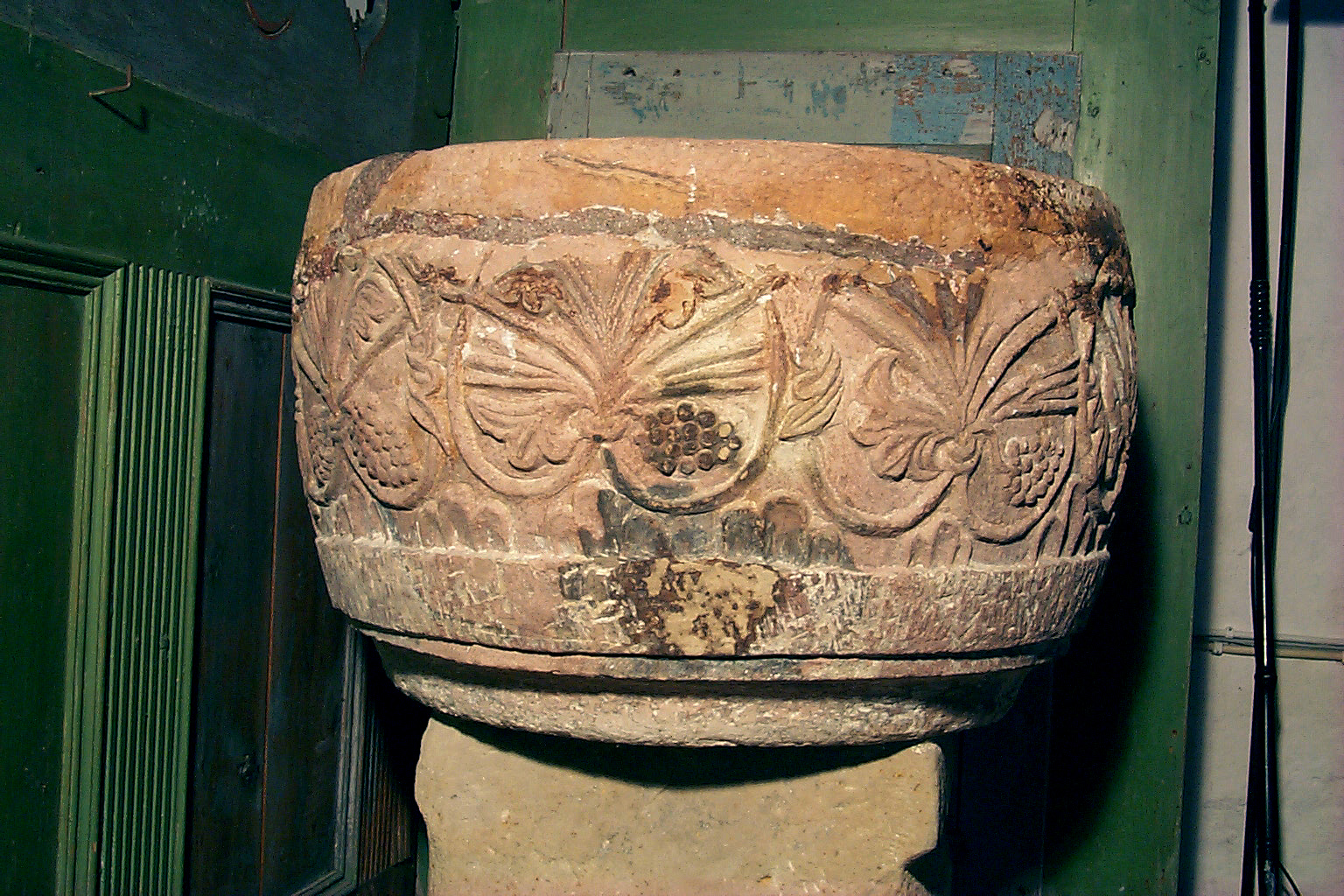 Den medeltida kyrkan i Stora Hammar, Skåne, Sverige.